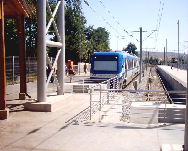 Estación Limache del Metro de Valparaíso.